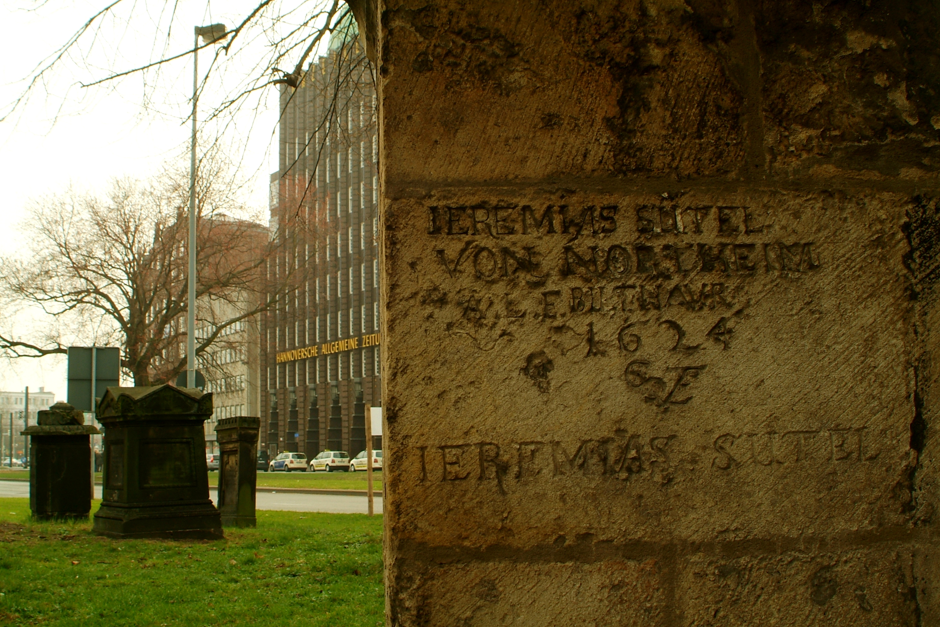 Inschrift des Jermias Sutel von Northeim an der Nikolaikapelle in Hannover, datiert 1624